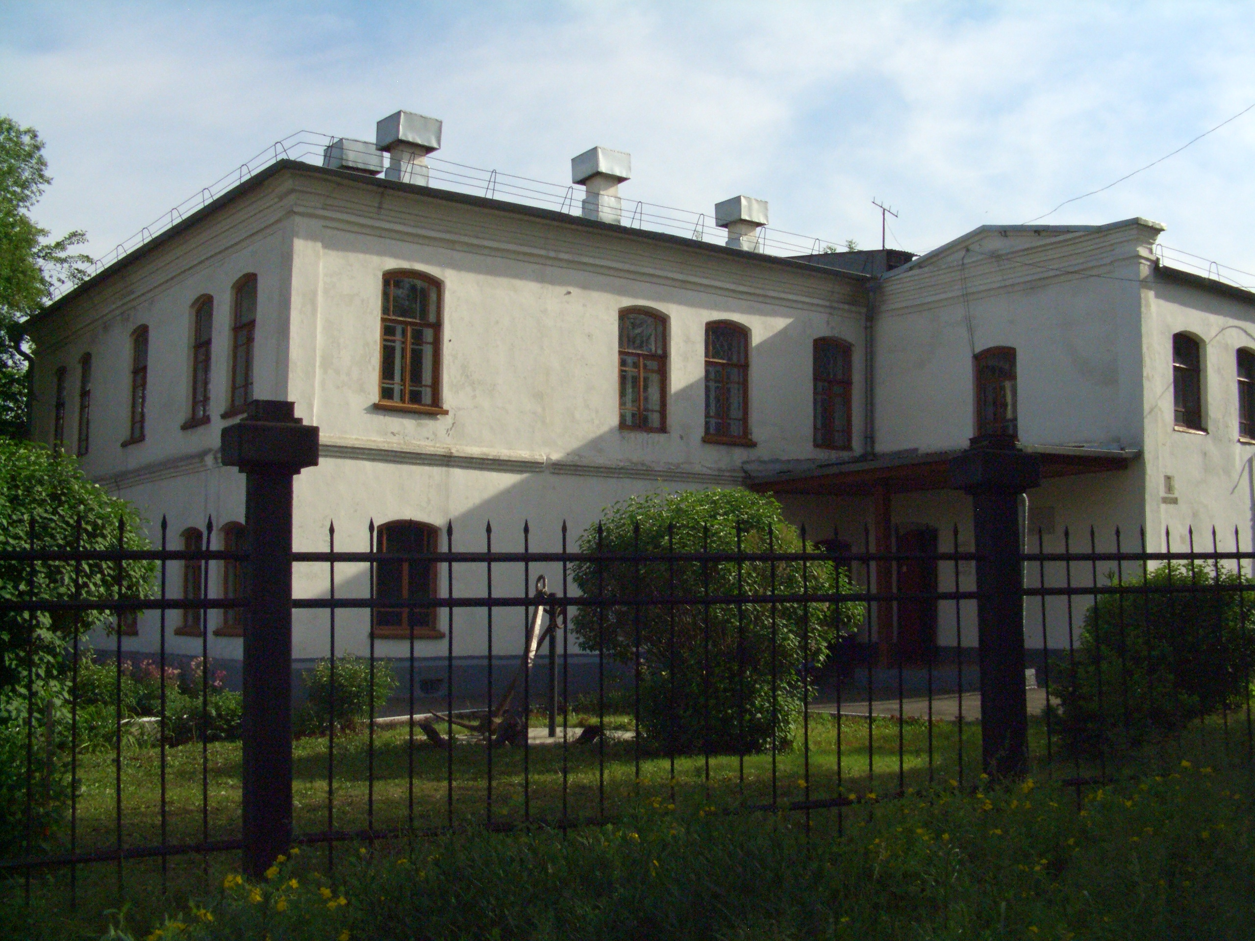 Здание уездного училища: улица Народная, 7а, Новокузнецк, Кемеровская область